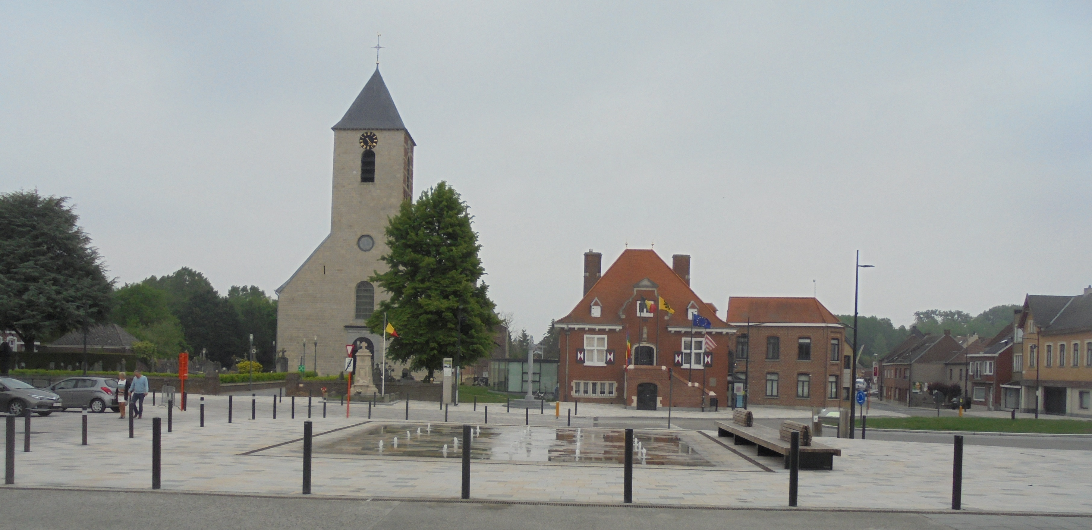 Sint-Michielskerk en gemeentehuis van Sint-Lievens-Houtem - Oost-Vlaanderen - België